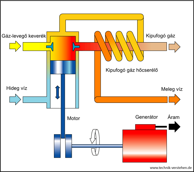 Prinzip einer BHKW-Anlage.